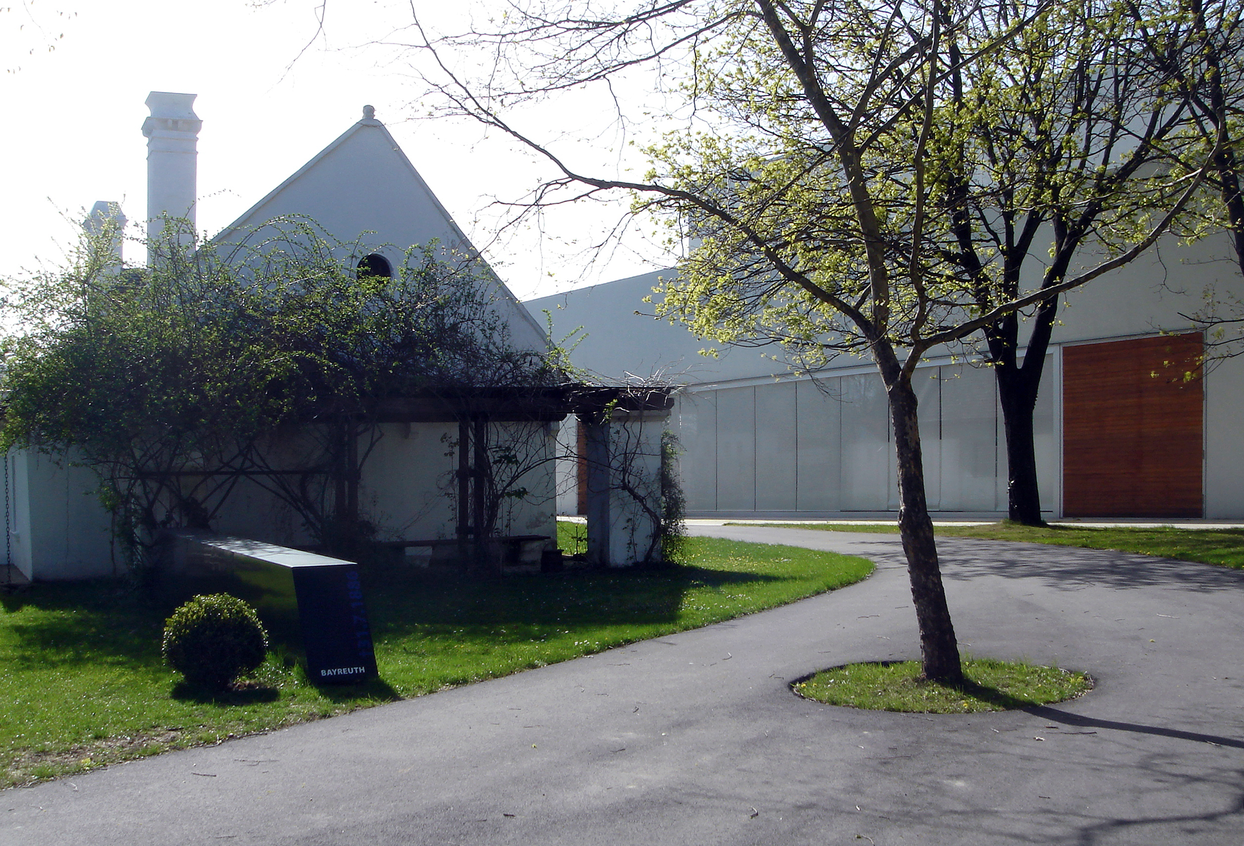 Raiding, Liszt-Zentrum, Geburtshaus, Konzerthaus